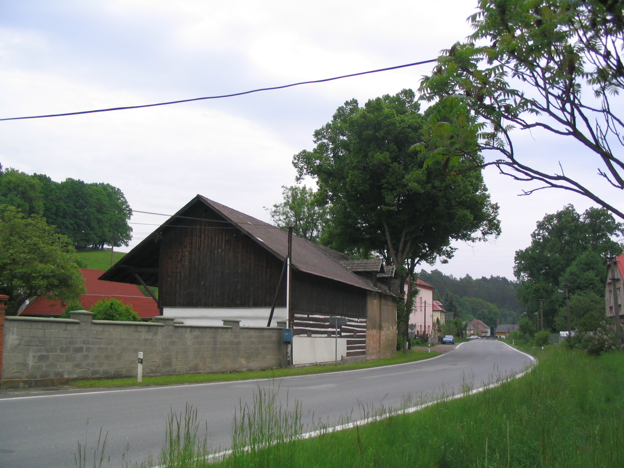 Village of Dolní Krupá, Czech Republic